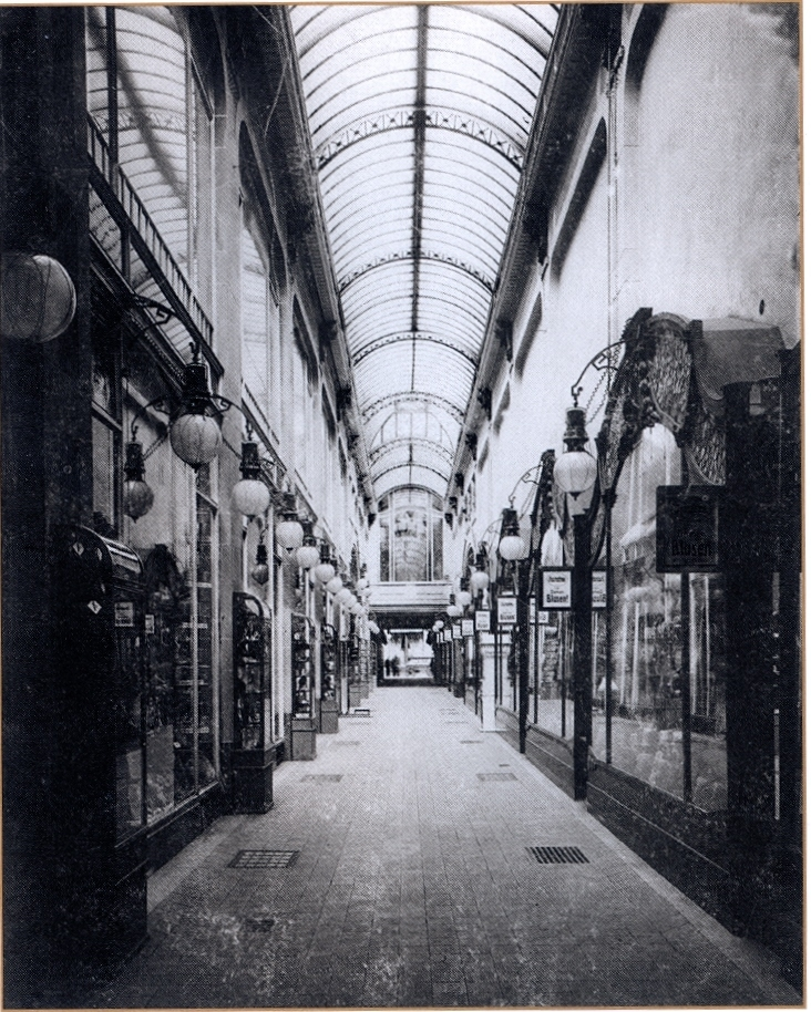 t